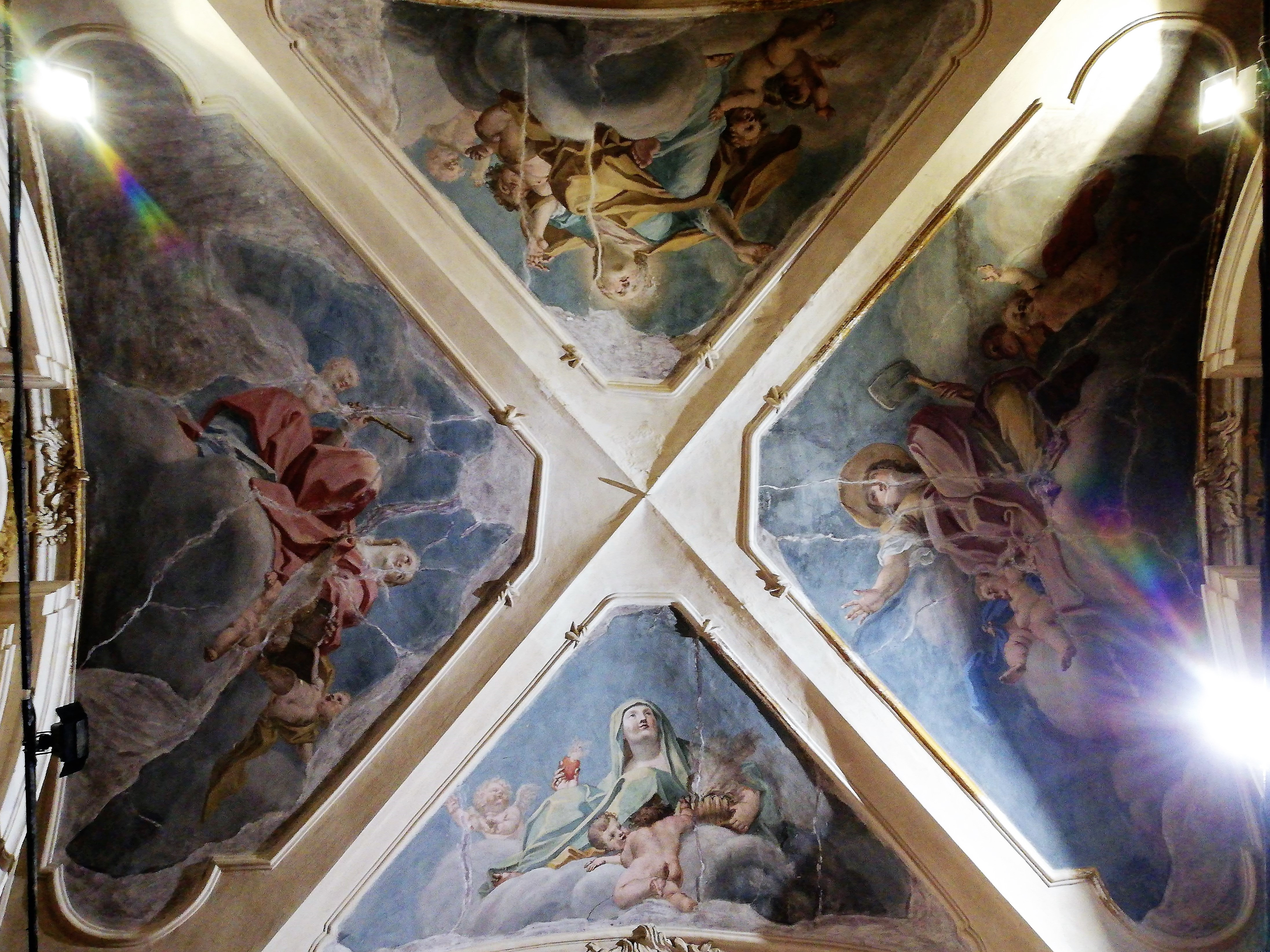 Affreschi volta ingresso.